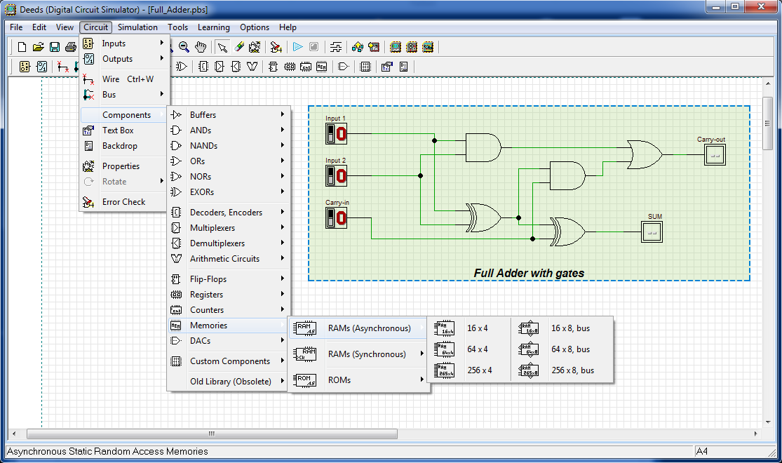 Screenshot der Software "Deeds-DcS" aus dem Softwarepaket Deeds. Zudem ist ein selbst erstelltes Beispiel einer elektronischen Schaltung gezeigt.